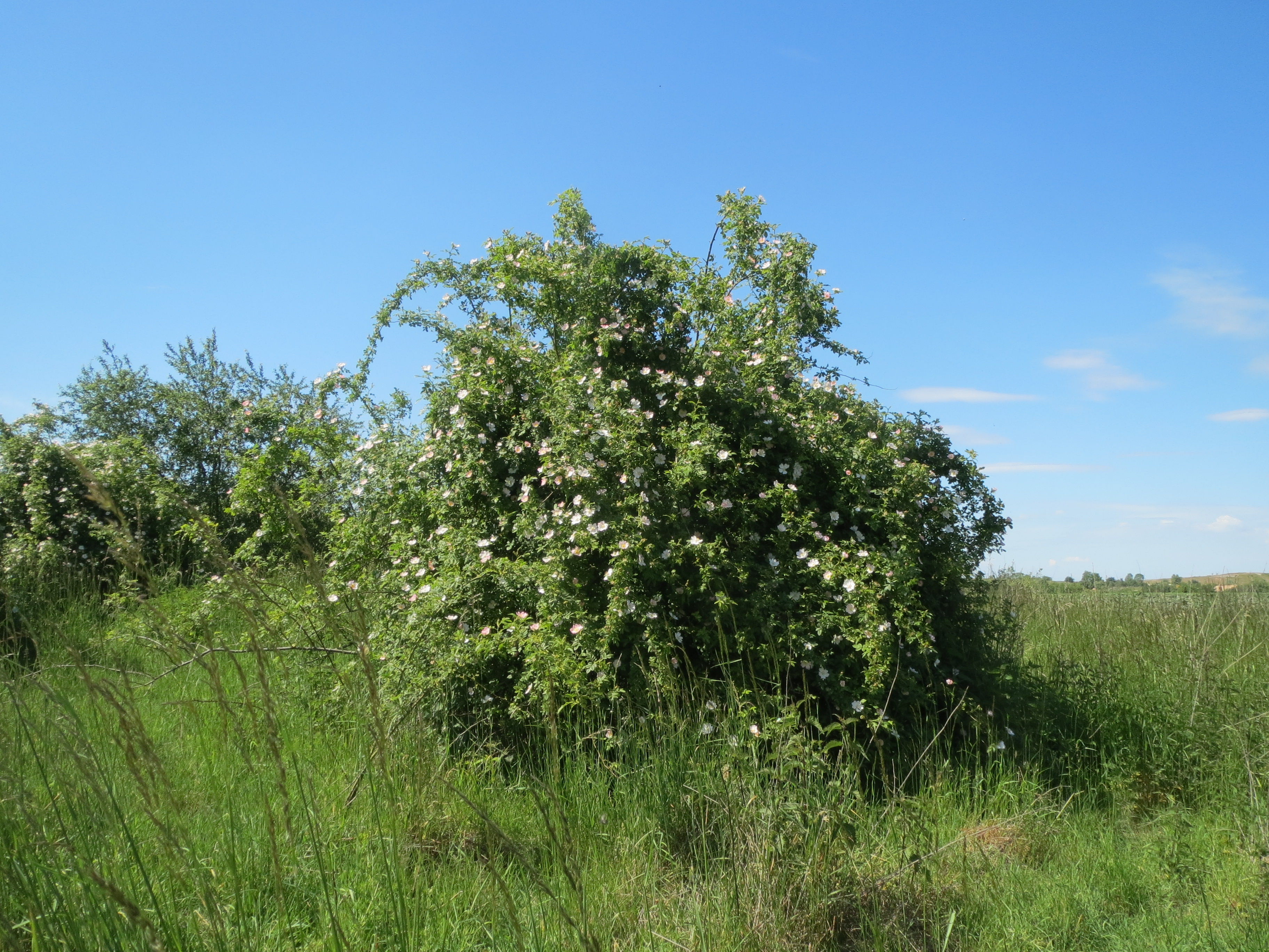 Hunds-Rose (Rosa canina) bei Neulußheim